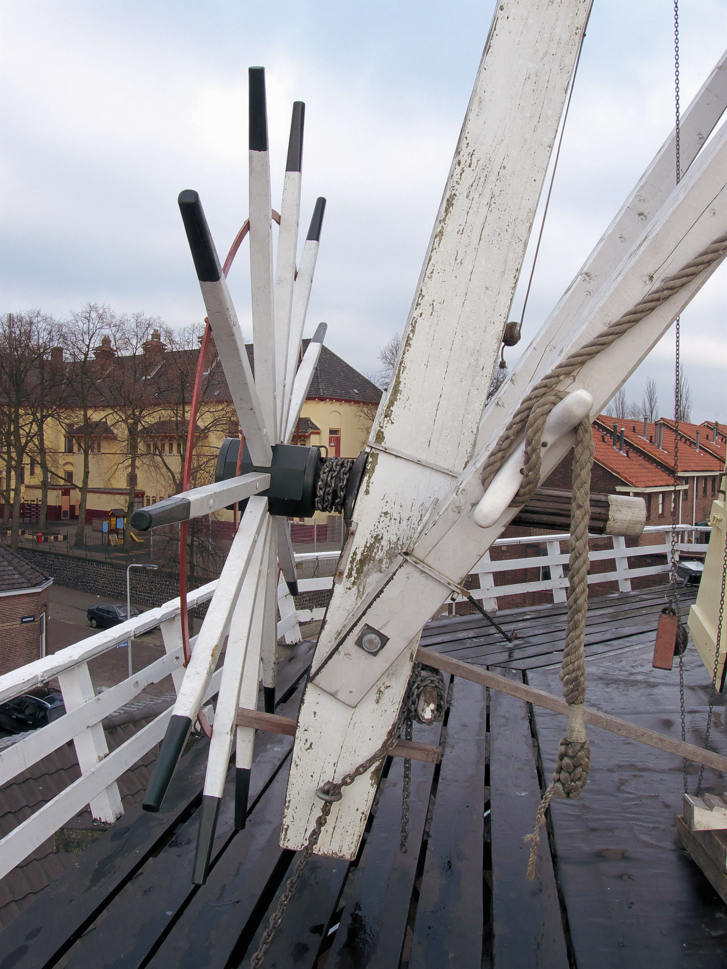 Molen De Kroon Arnhem kruiwie